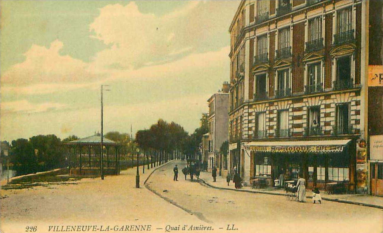 Villeneuve-la-Garenne.Quai d'Asnières.Kiosque